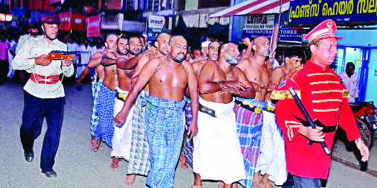 മലബാര്‍ സമരം 90' അനുസ്മരണ സമിതി തിരൂരില്‍ സംഘടിപ്പിച്ച വാഗണ്‍ ട്രാജഡി സംഭവത്തിന്റെ പുനരാവിഷ്‌ക്കാരത്തിന്റെ ഭാഗമായി പോരാളികളെ പിടികൂടി തിരൂര്‍ റയില്‍വേ സ്റ്റേഷനിലേക്കു കൊണ്ടുവരുന്ന പ്രതീകാത്്മക രംഗം